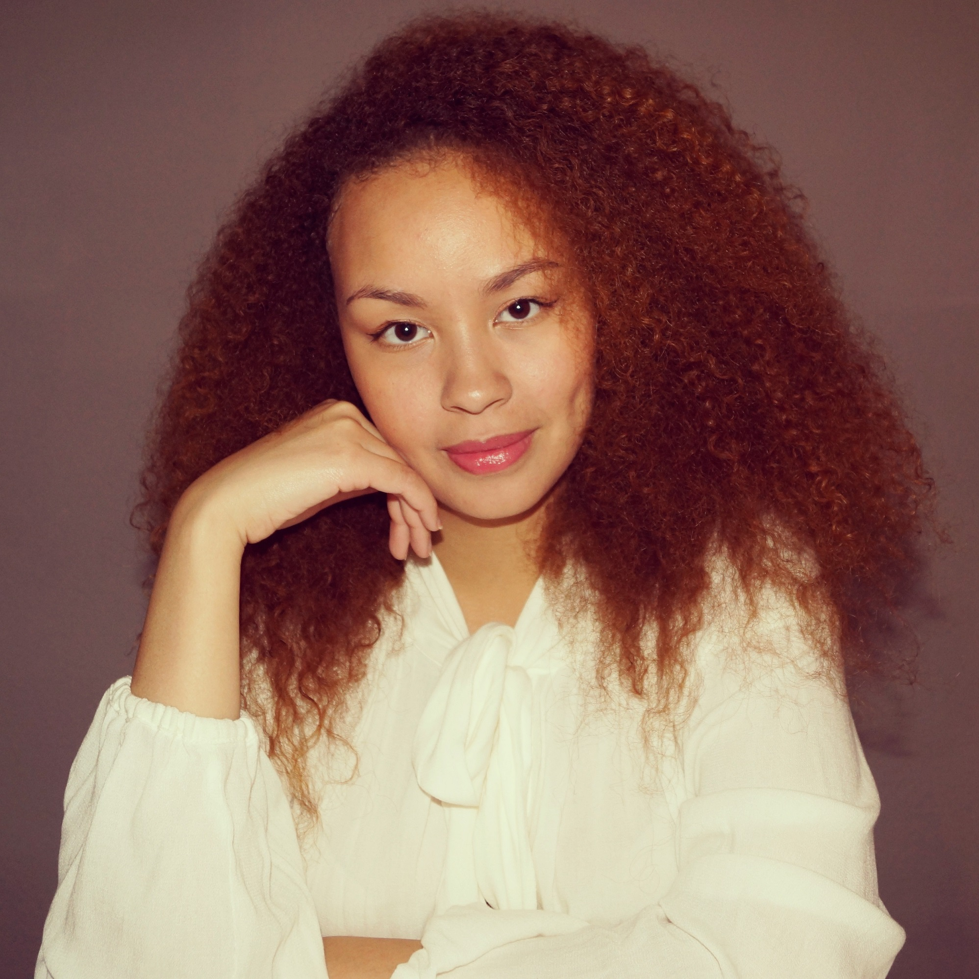 Portrai der deutschen Autorin Miranda J. Fox